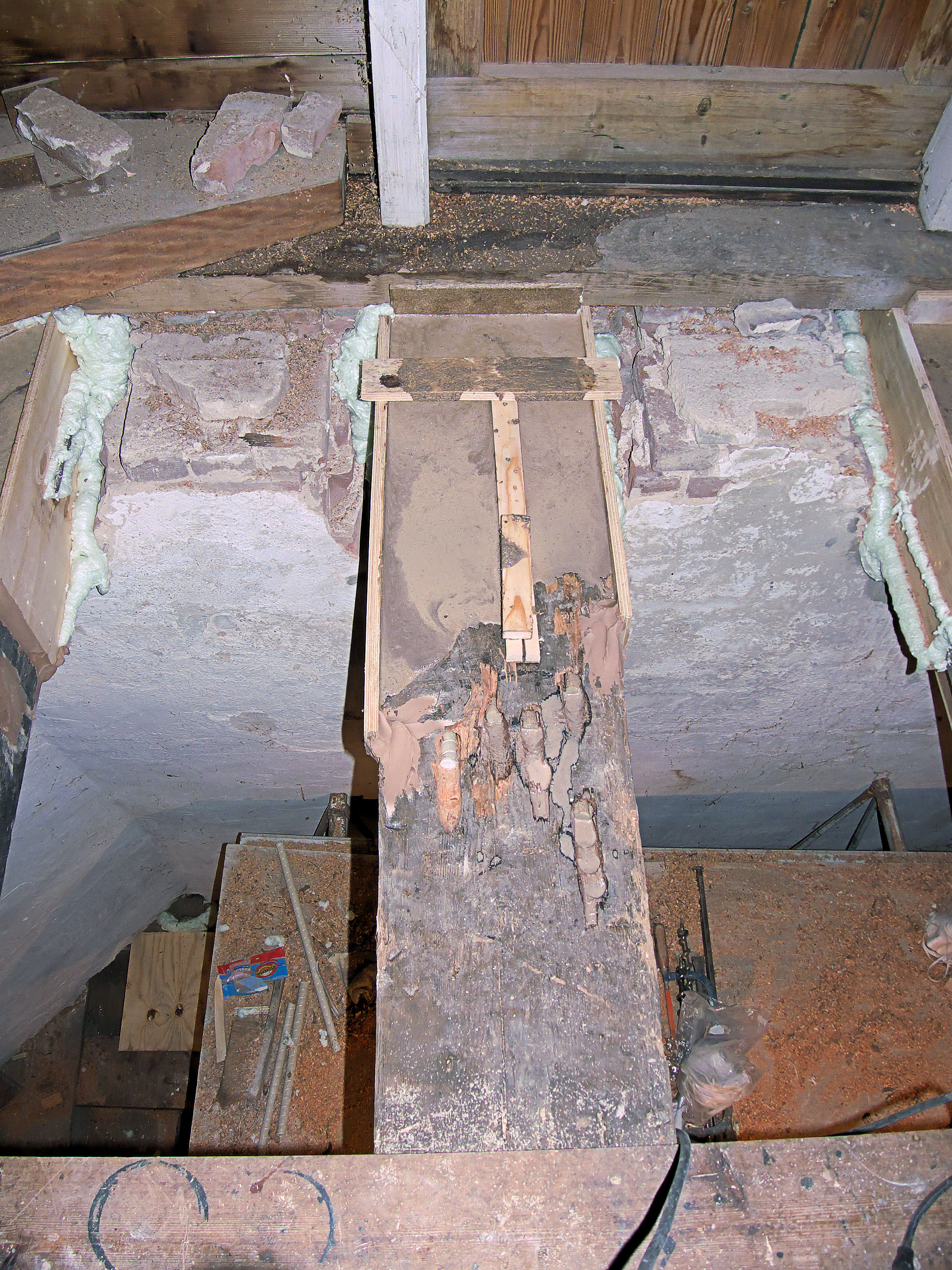 Walderveense molen aangieten balkkoppen met epoxyhars